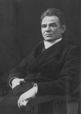 Ksiądz Antoni Jan Ludwiczak